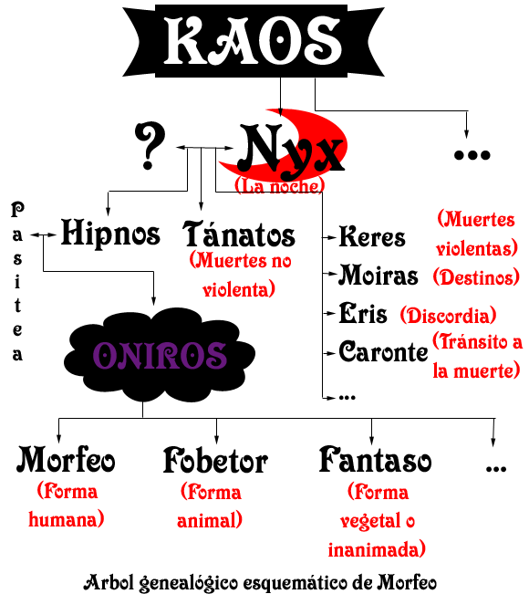 Árbol genealógico esquemático de Morfeo.